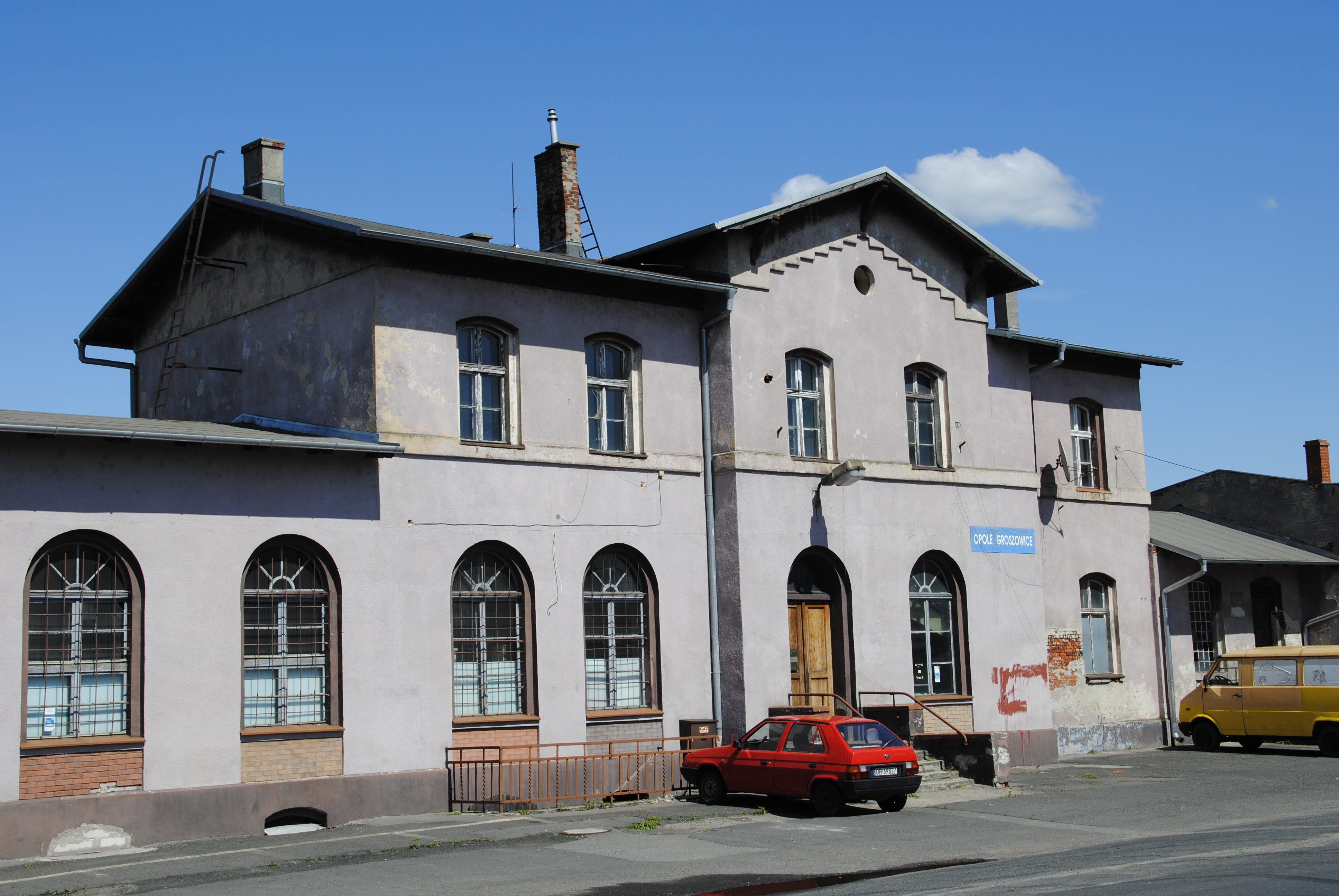 Bahnhof Oppeln-Groschowitz